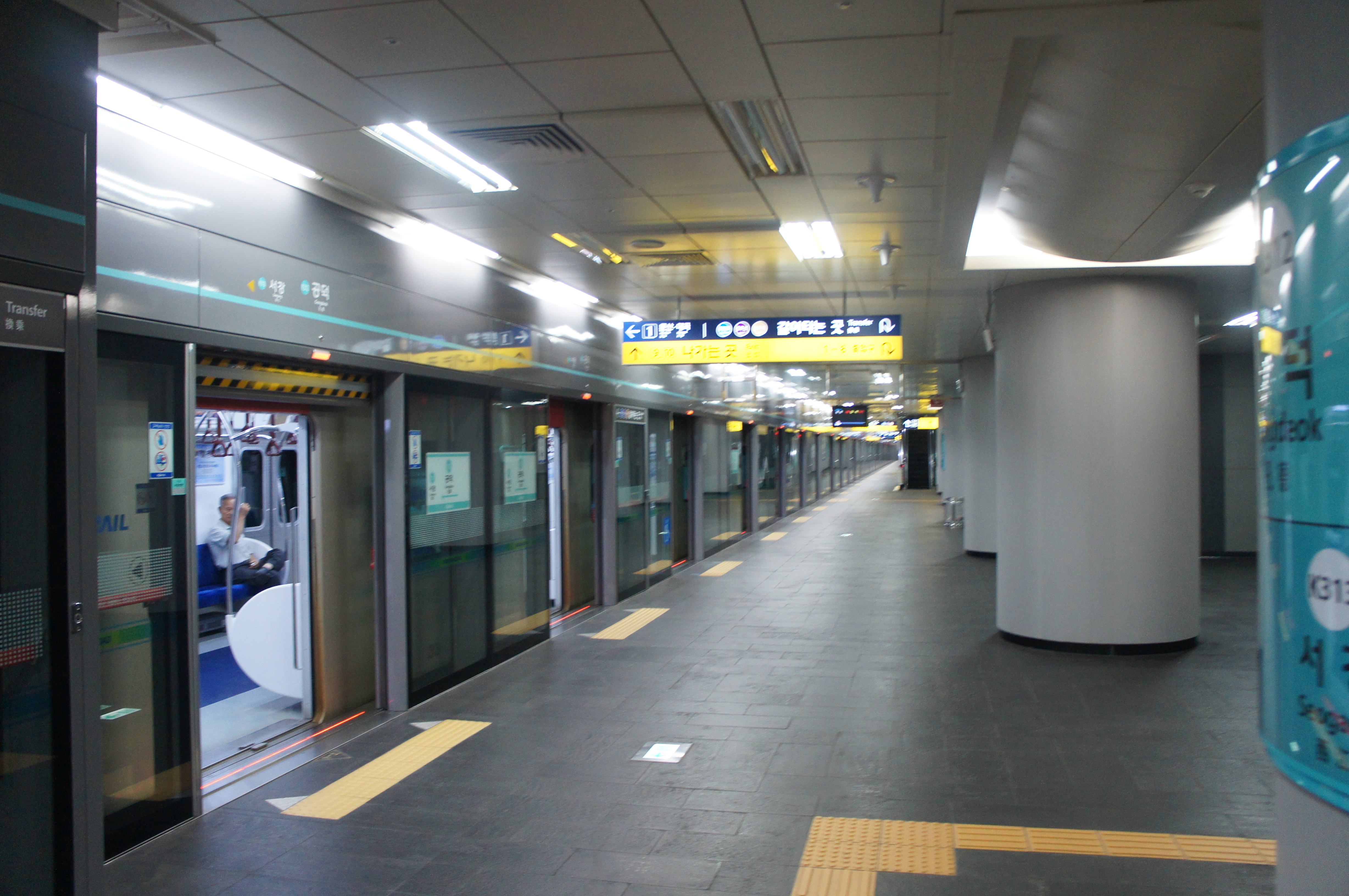 경의선 공덕역 승강장